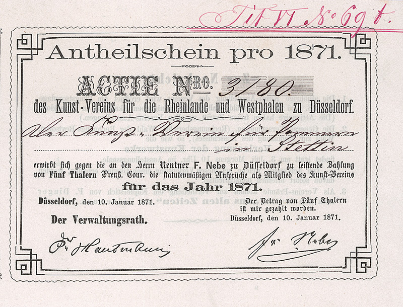 Anteilschein des Kunst-Verins für die Rheinlande und Westphalen vom 10. Januar 1871